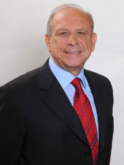 Juan Carlos Latorre Carmona